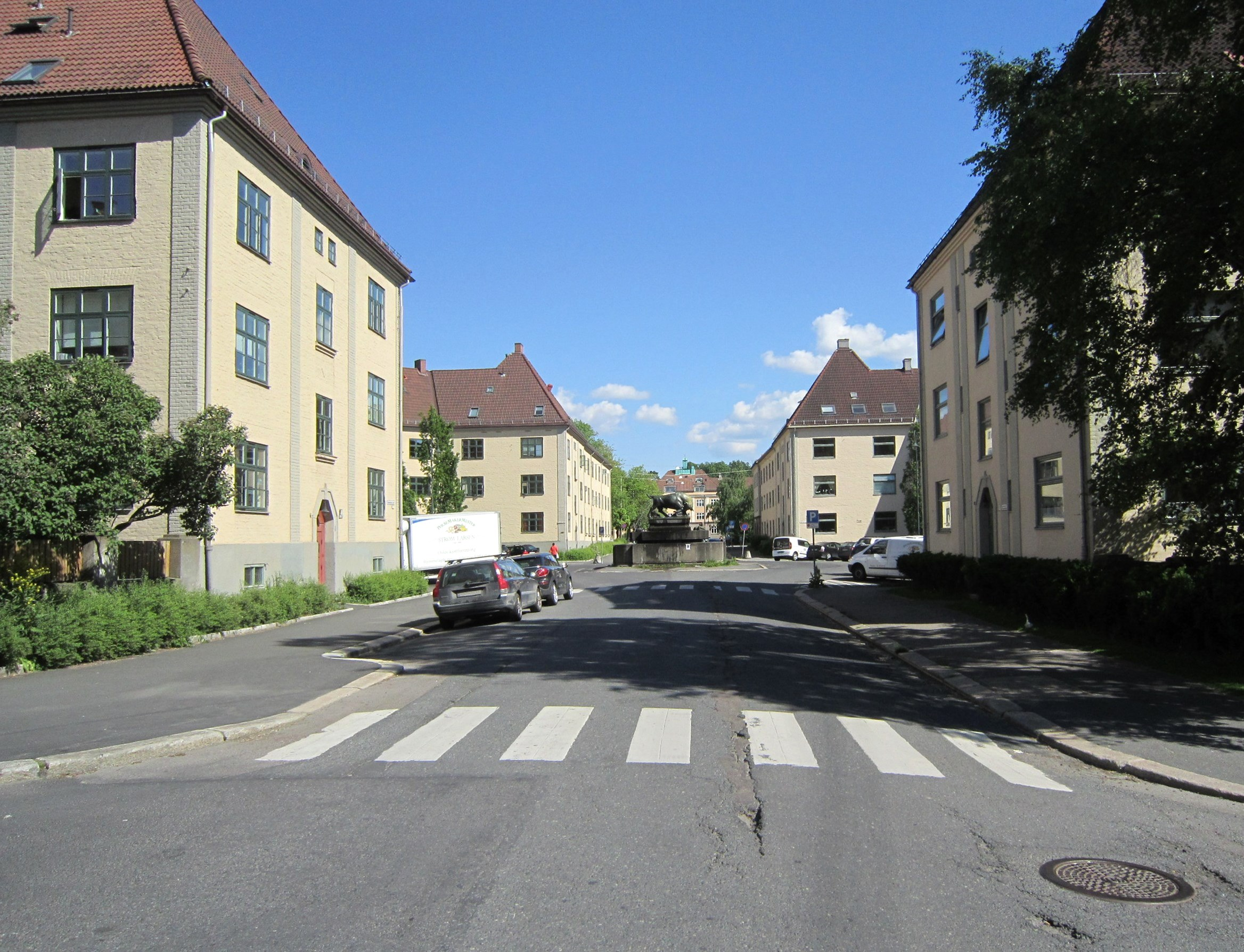 Hegermanns gate på Torshov i Oslo